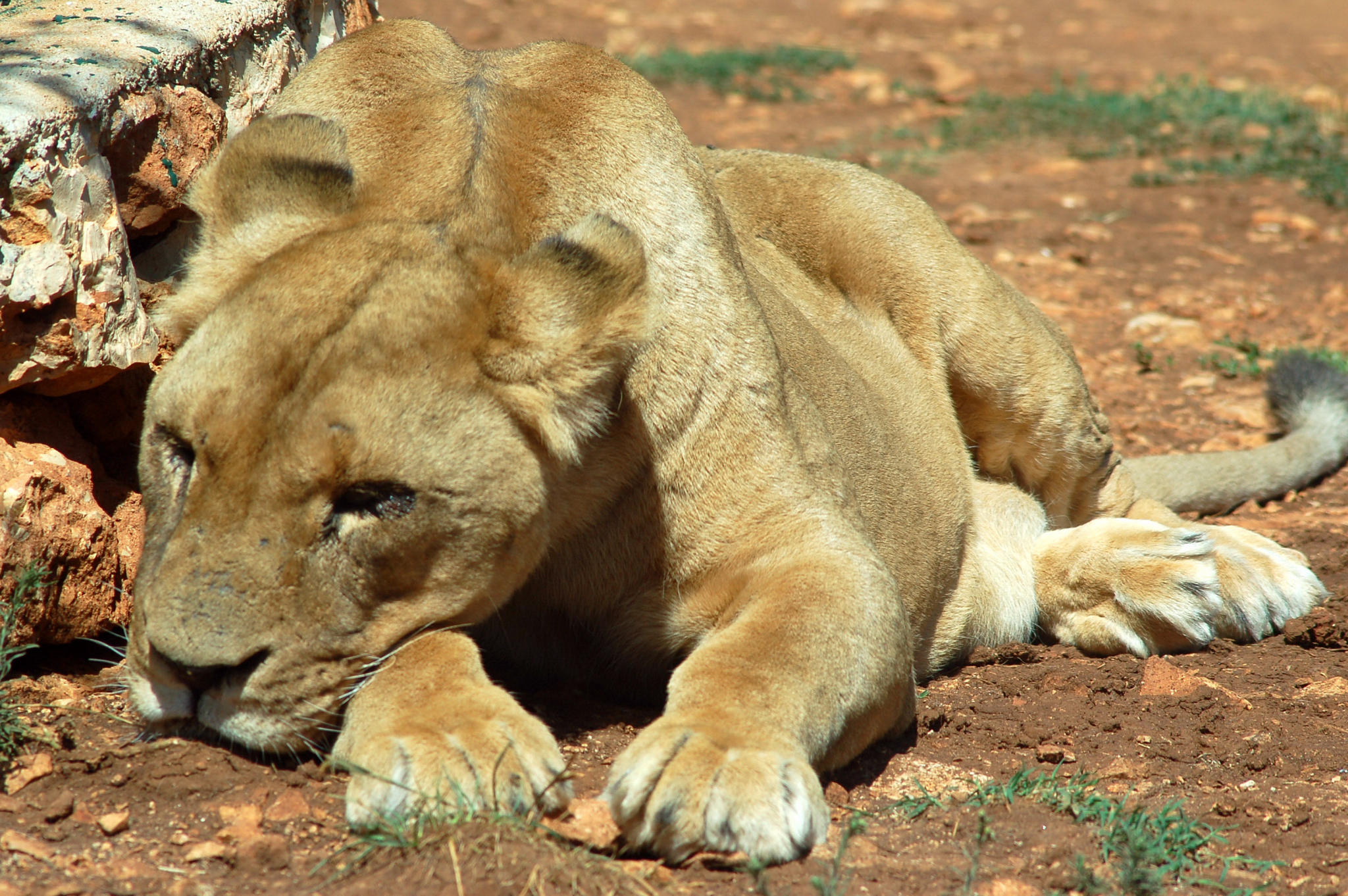 Zoosafari